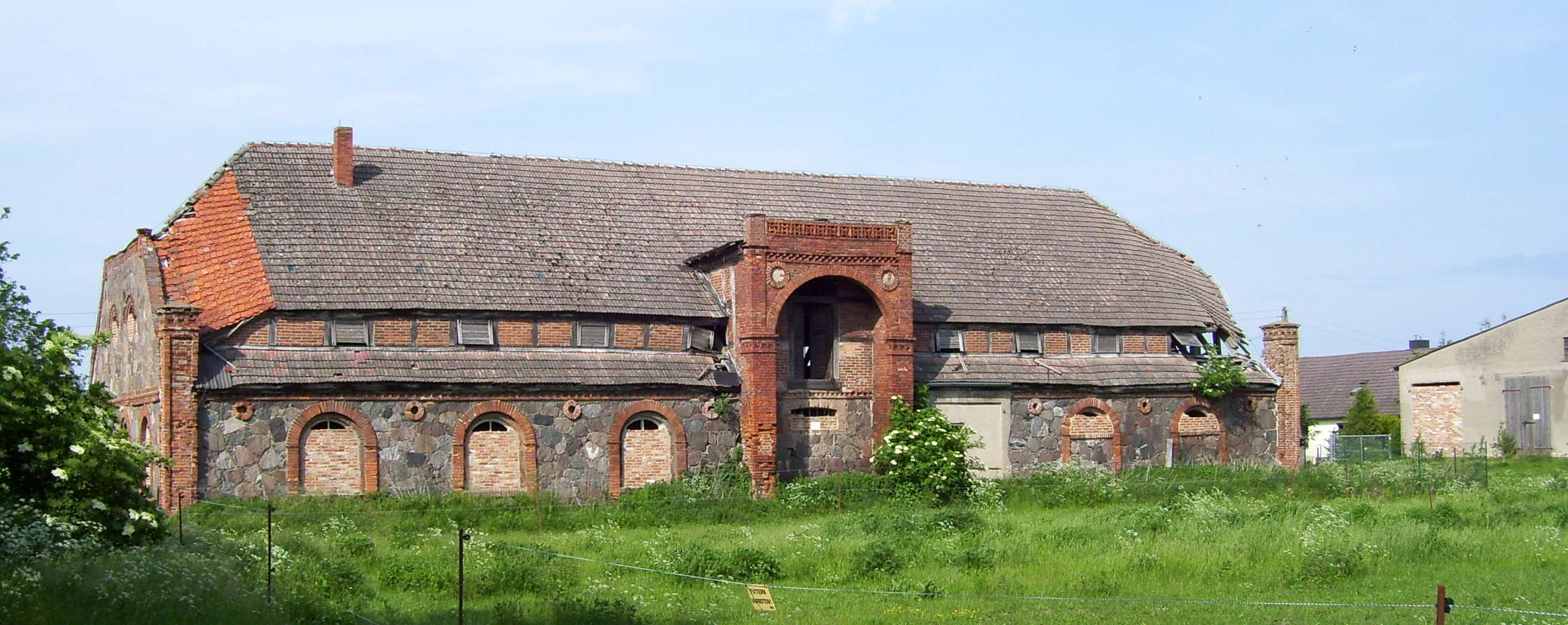 Kartlow - Landkreis Demmin - Gutshof: ehemaliger Stall für die Ackerpferde, ehemaliges LPG-Büro, einsturzgefährdet